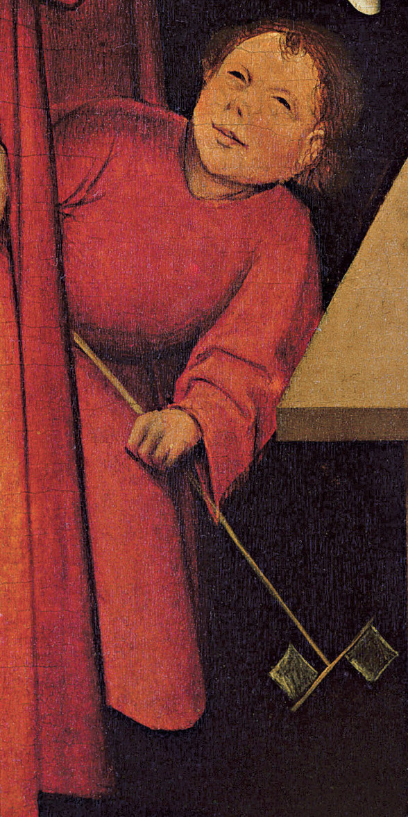 Détail de L'Escamoteur de Jérôme Bosch